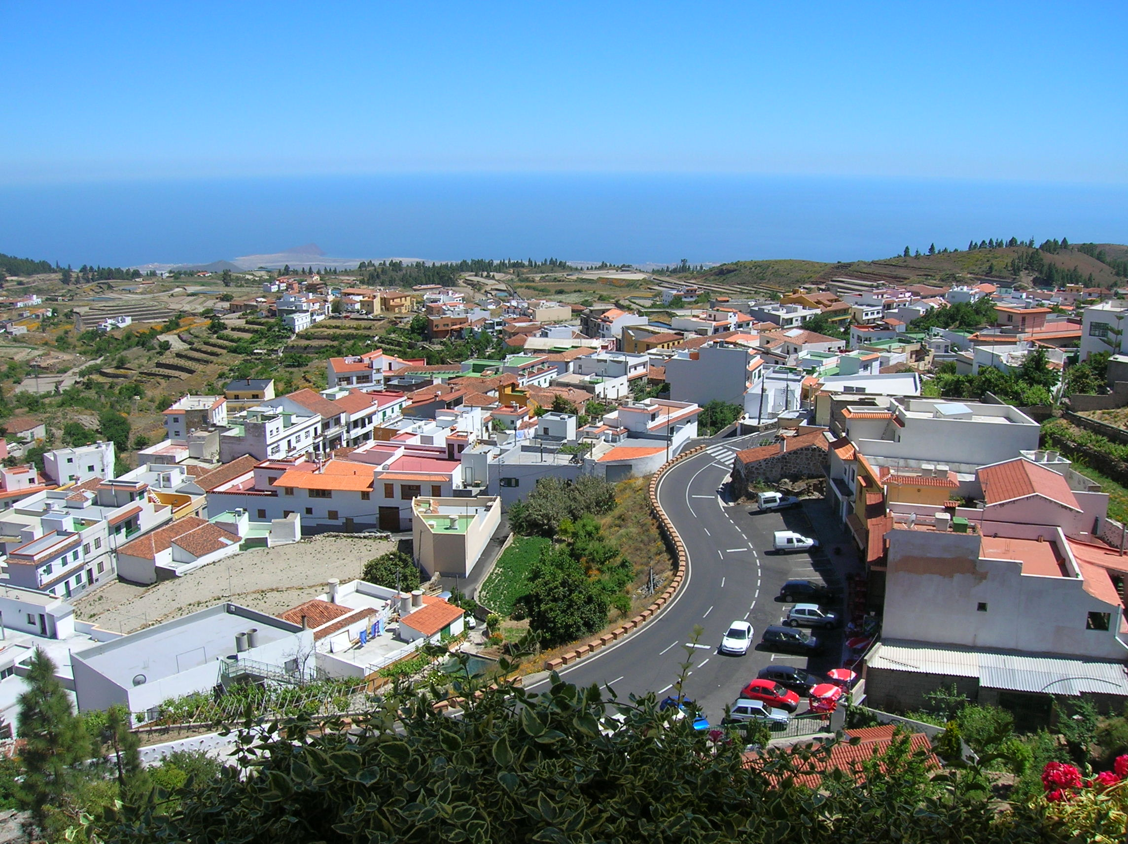 Vilaflor, Tenerife